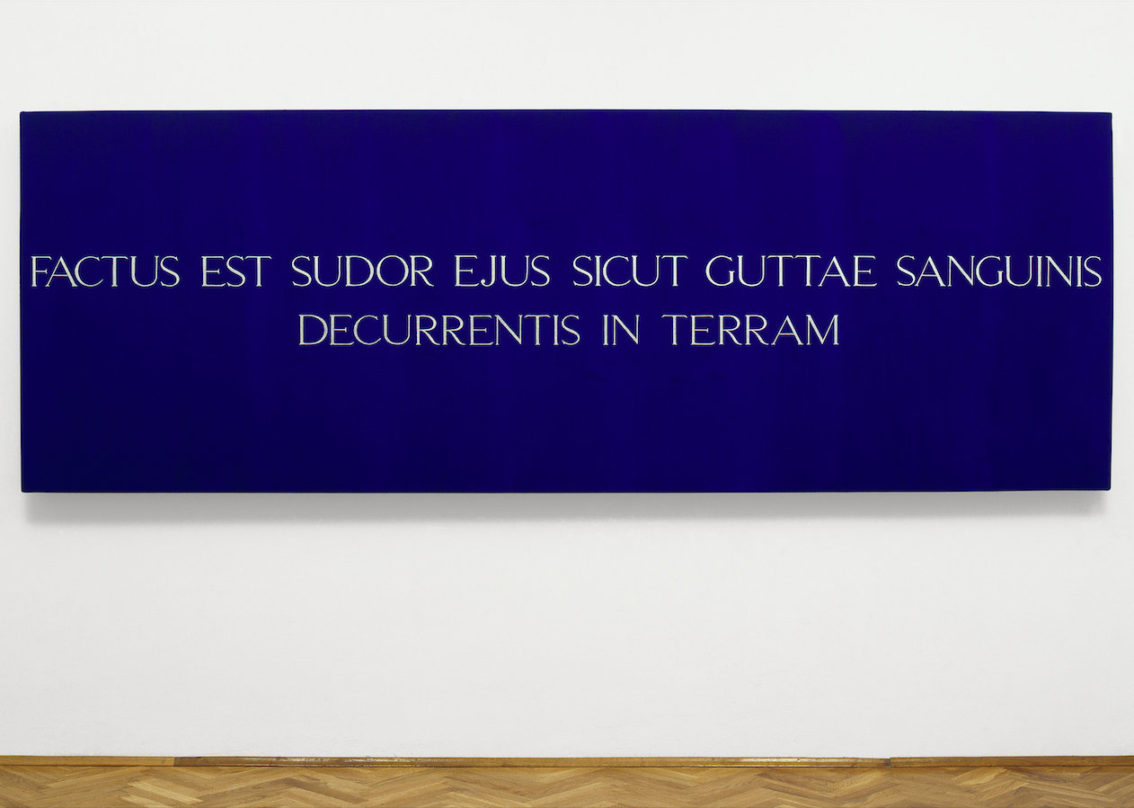 Ulje na platnu "Ignoto II" Ante Jerkovića izrađeno je 1995-1996, a fotografirao ga je Boris Cvjetanović 2009 godine.